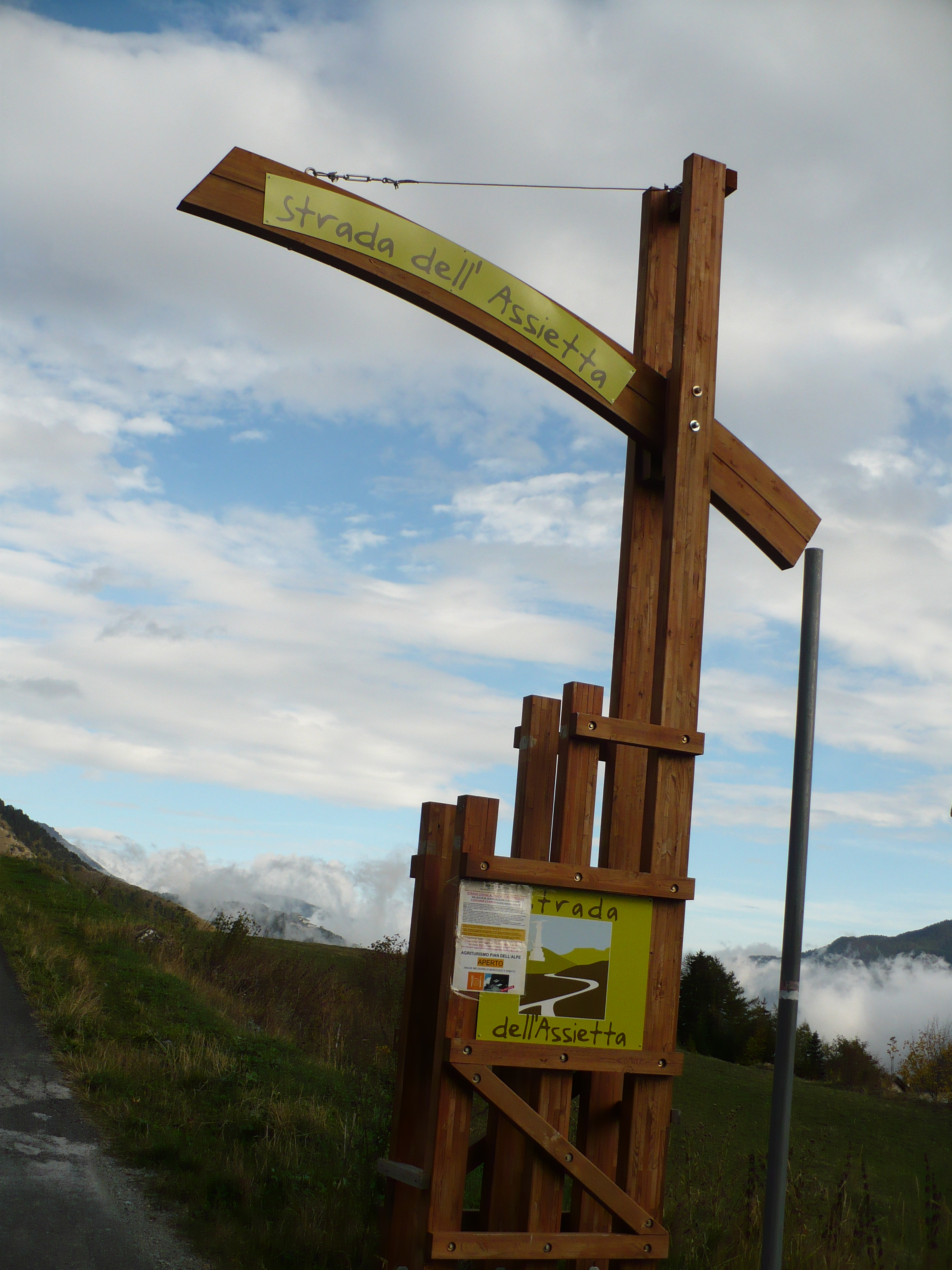 Cartello indicatore della Strada dell'Assietta - Val Chisone - Provincia di Torino - Italia